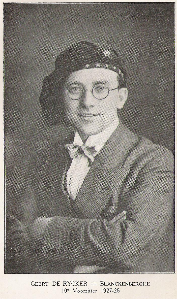 Student Geert De Rijcker (1901-1940), actief in KVHV-Leuven en AVHV-Gent (1927-29), nationaal AVHV-voorzitter (1928-29)